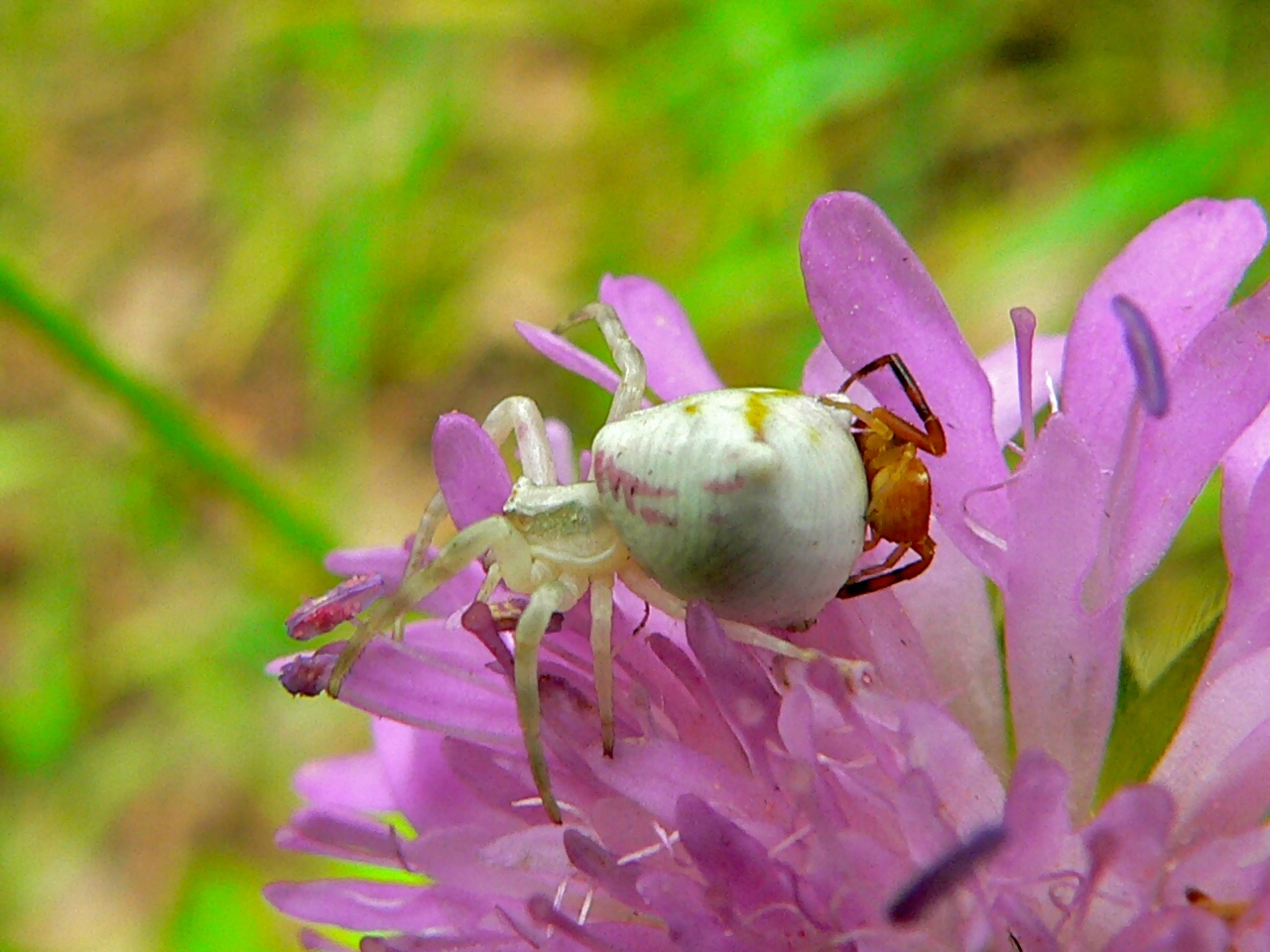 Rosis, Hérault, FRANCE